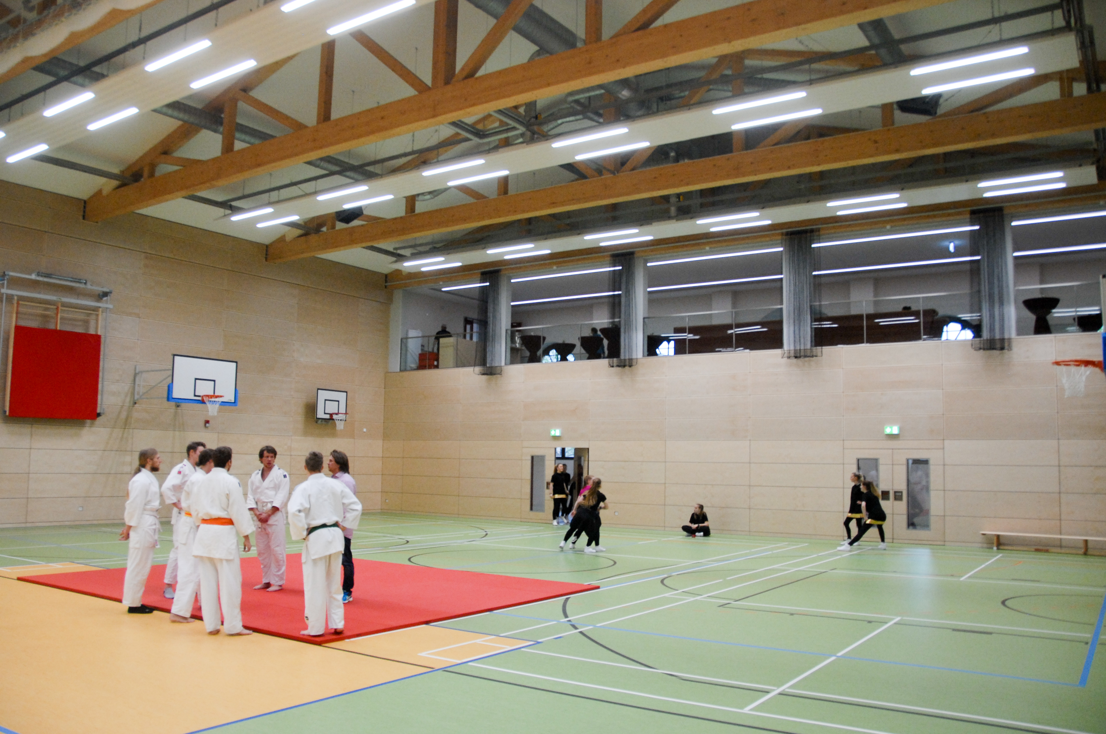 Zittauer Hauptturnhalle am Stadtring im Jahr 2018